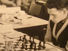 Rechts im Bild Werner Pesch bei seiner Partie gegen Kozma, Europamannschaftsmeisterschaft 1961 in Oberhausen.